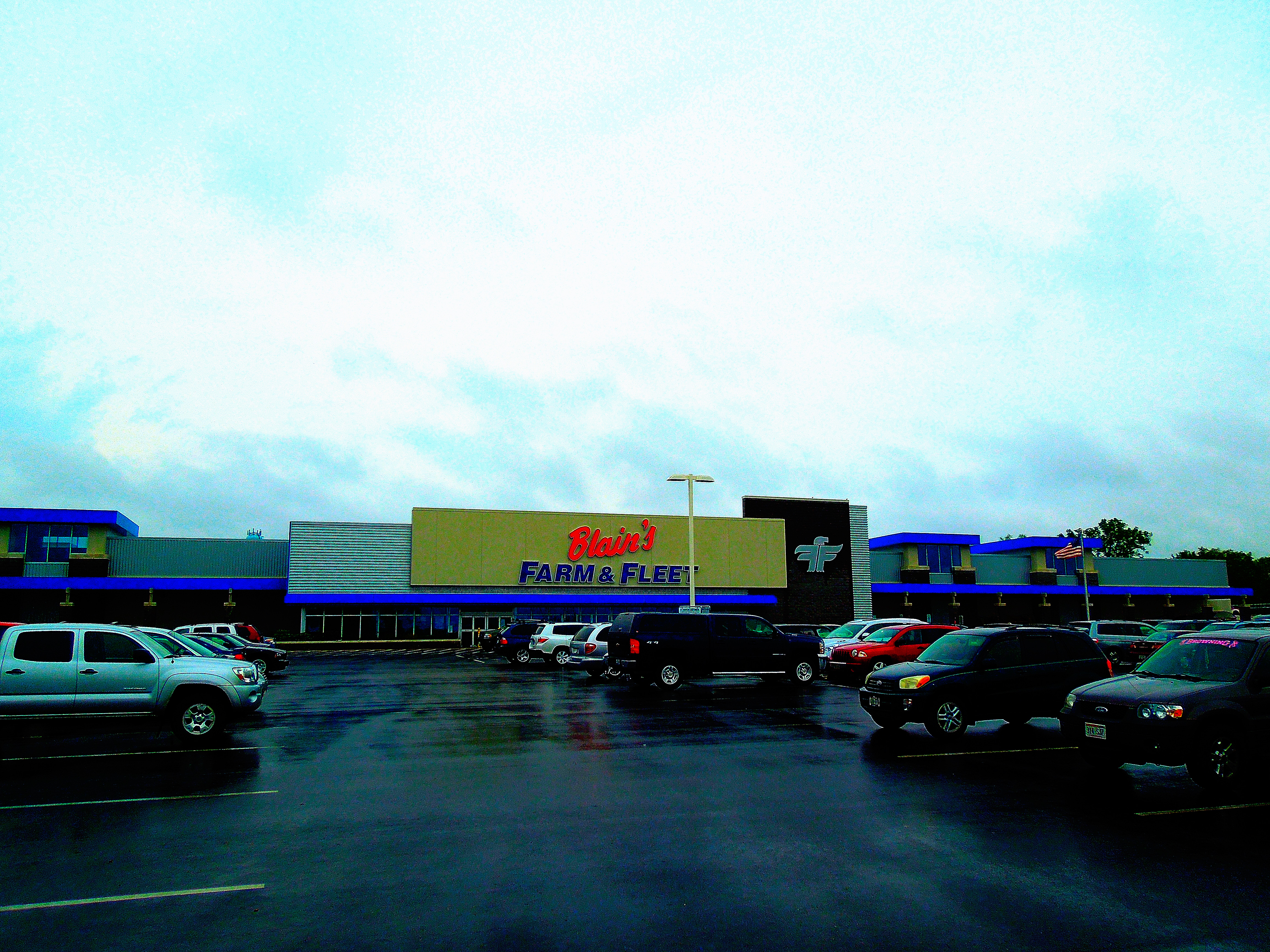 Blain's Farm & Fleet Verona